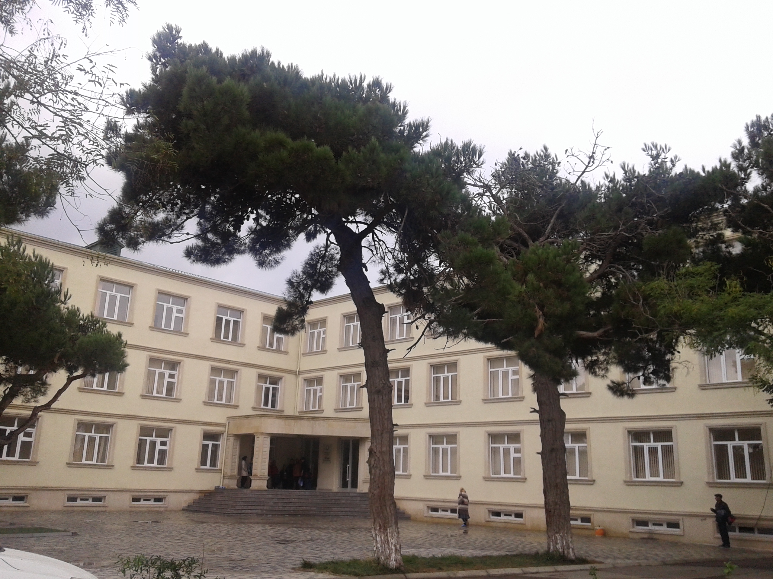 Zabrat mektəb